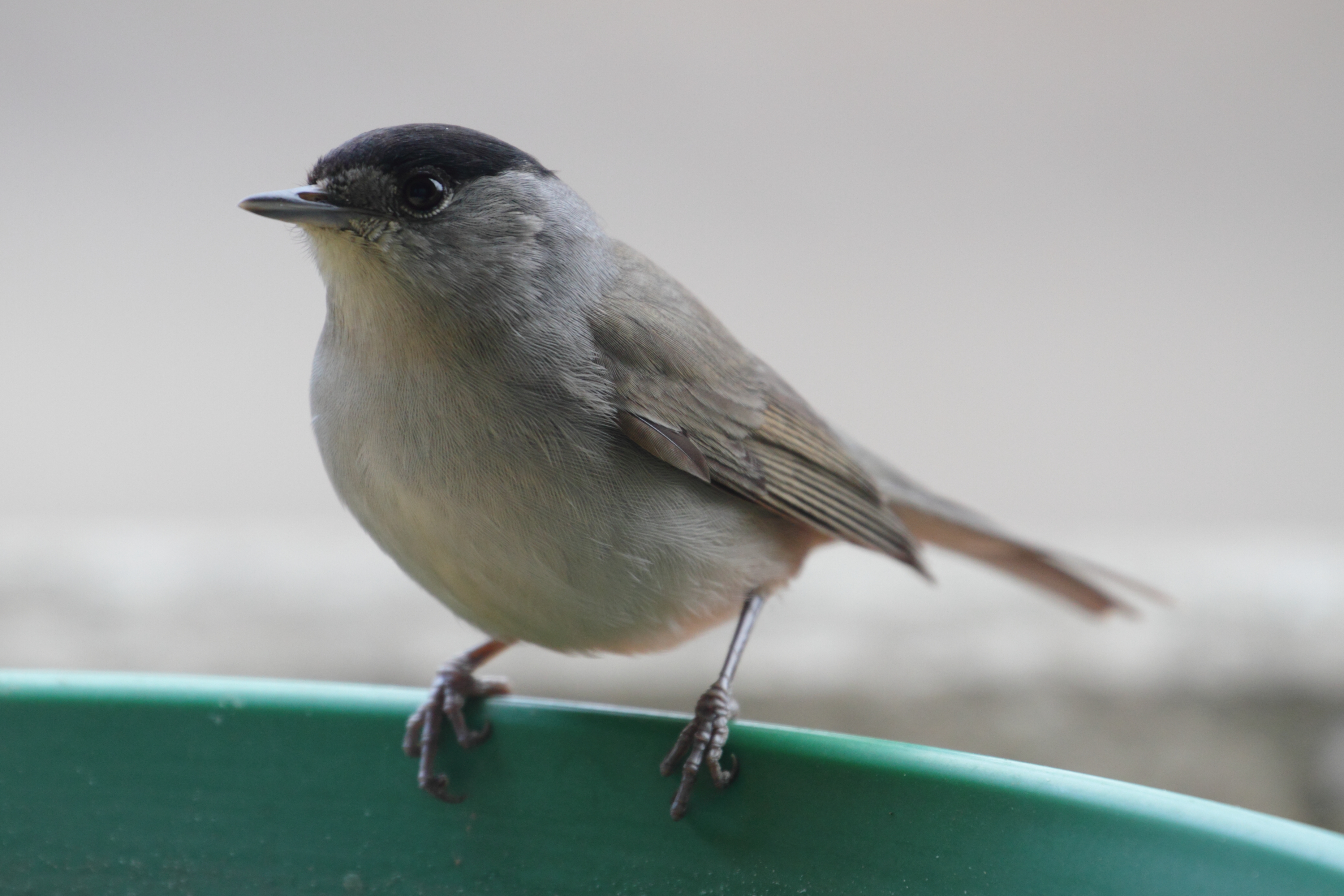 Eine männliche Mönchsgrasmücke Sylvia atricapilla im Burgenland.